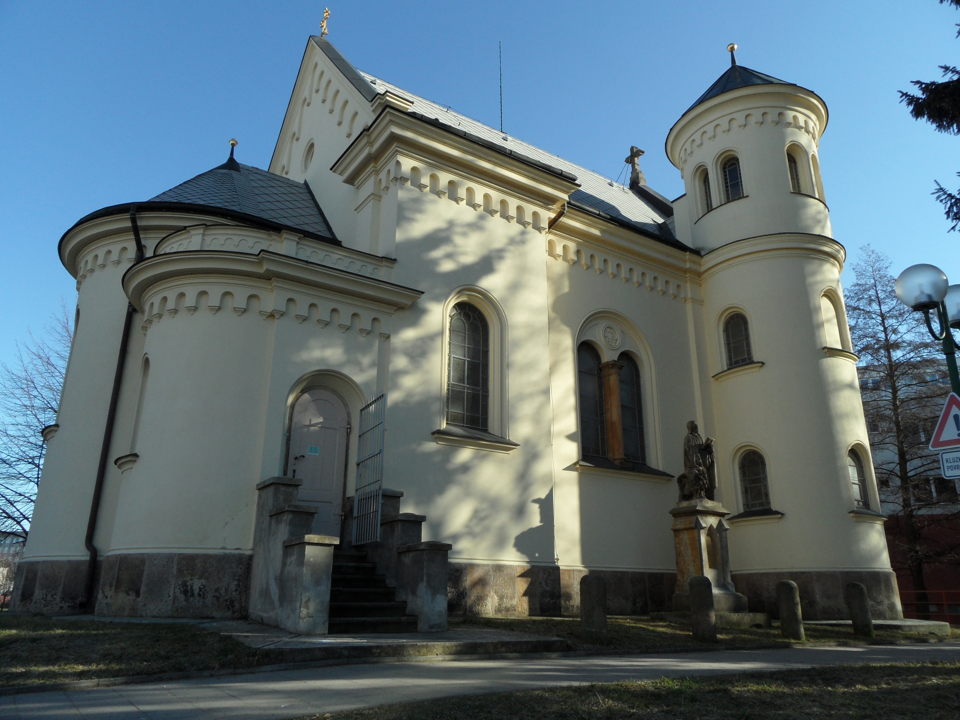 Kaple Panny Marie na Rožmberku